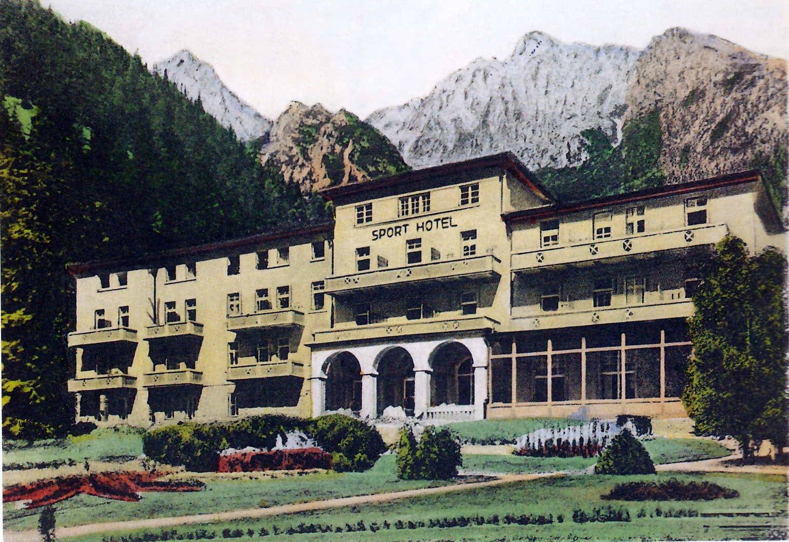 Banka československých légií v roku 1928 postavila na Hrebienku vo Vysokých Tatrách Sport hotel.